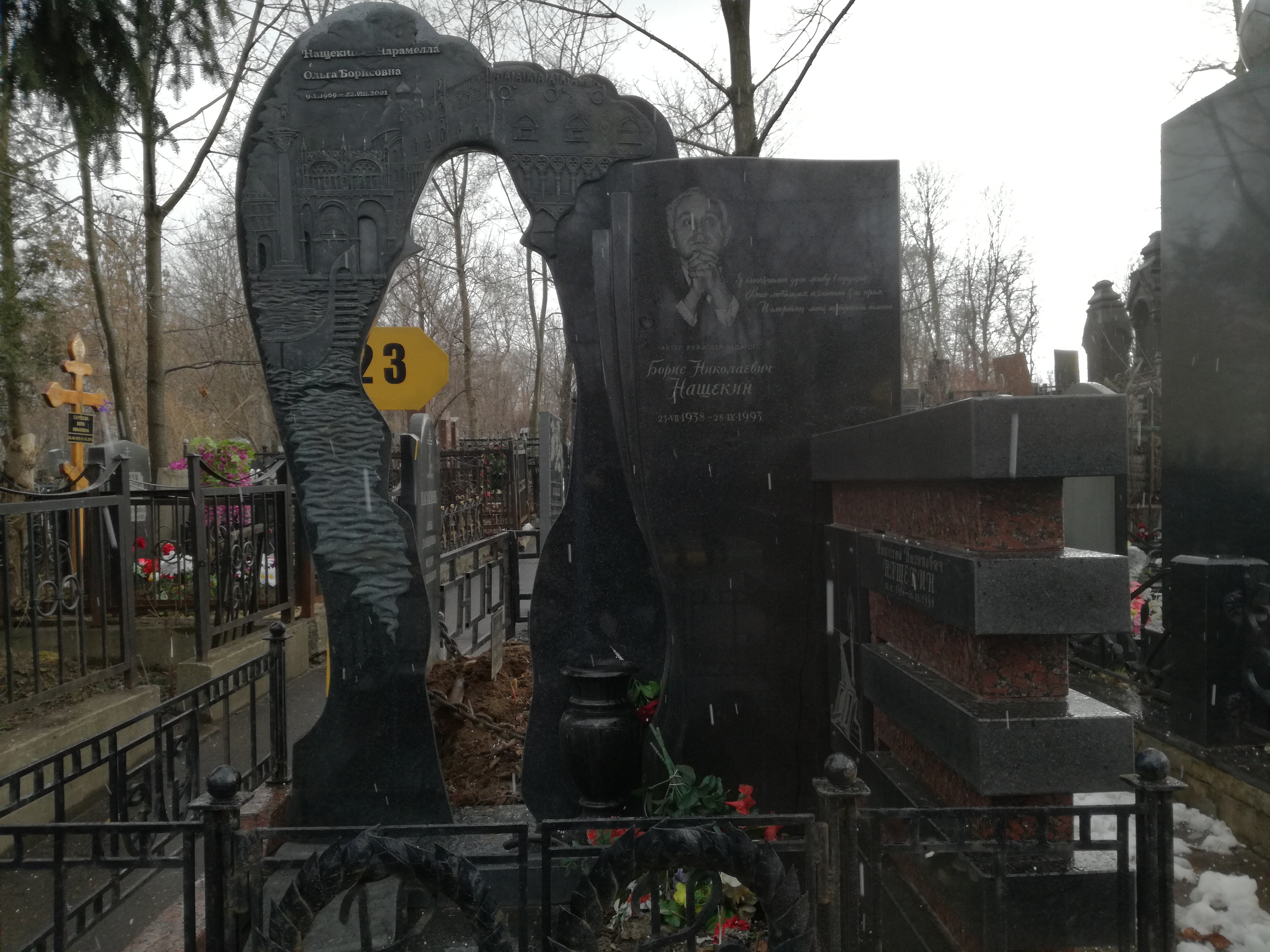 Даниловское кладбище